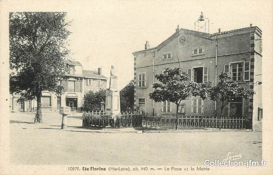 mairie